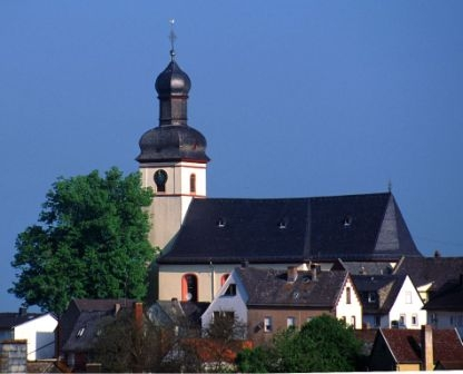 Ansicht Pfarrkirche St. Nikolaus in Haintchen/Taunus